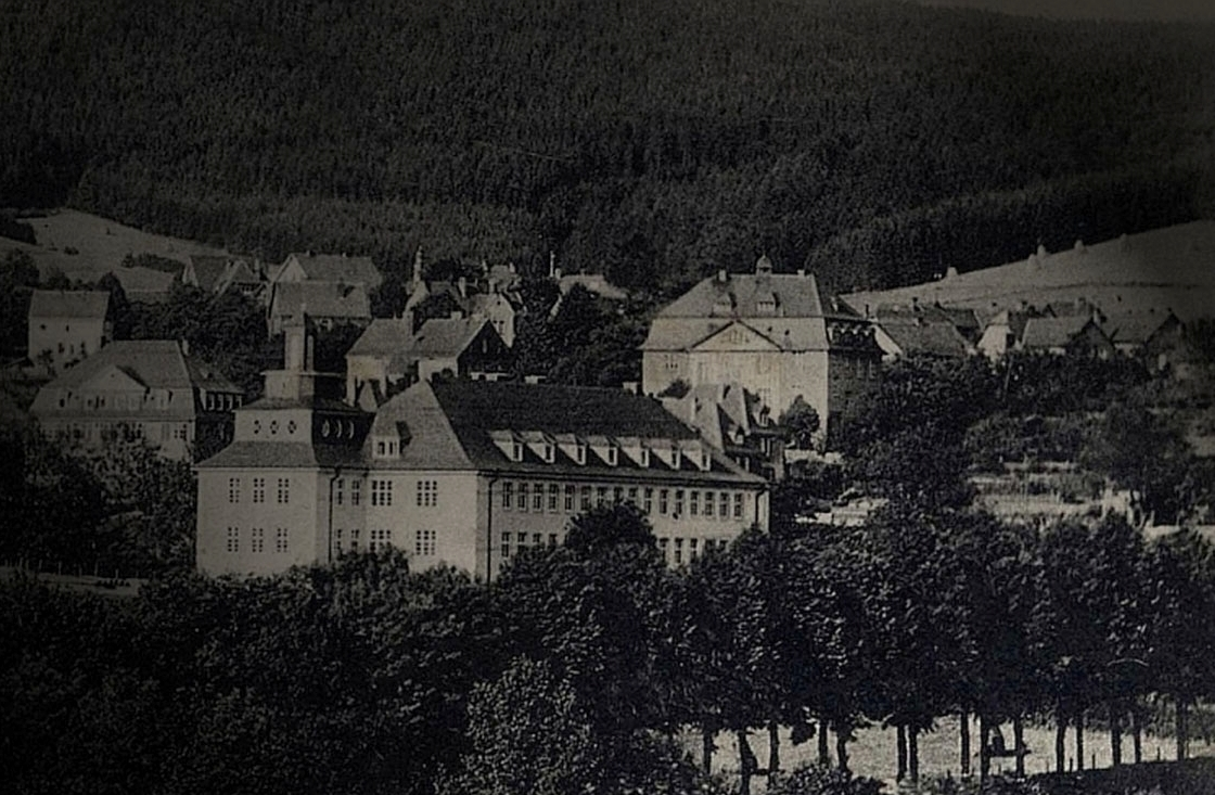 Alte Schule, heutige Akademie in Bad Fredeburg (Germany)